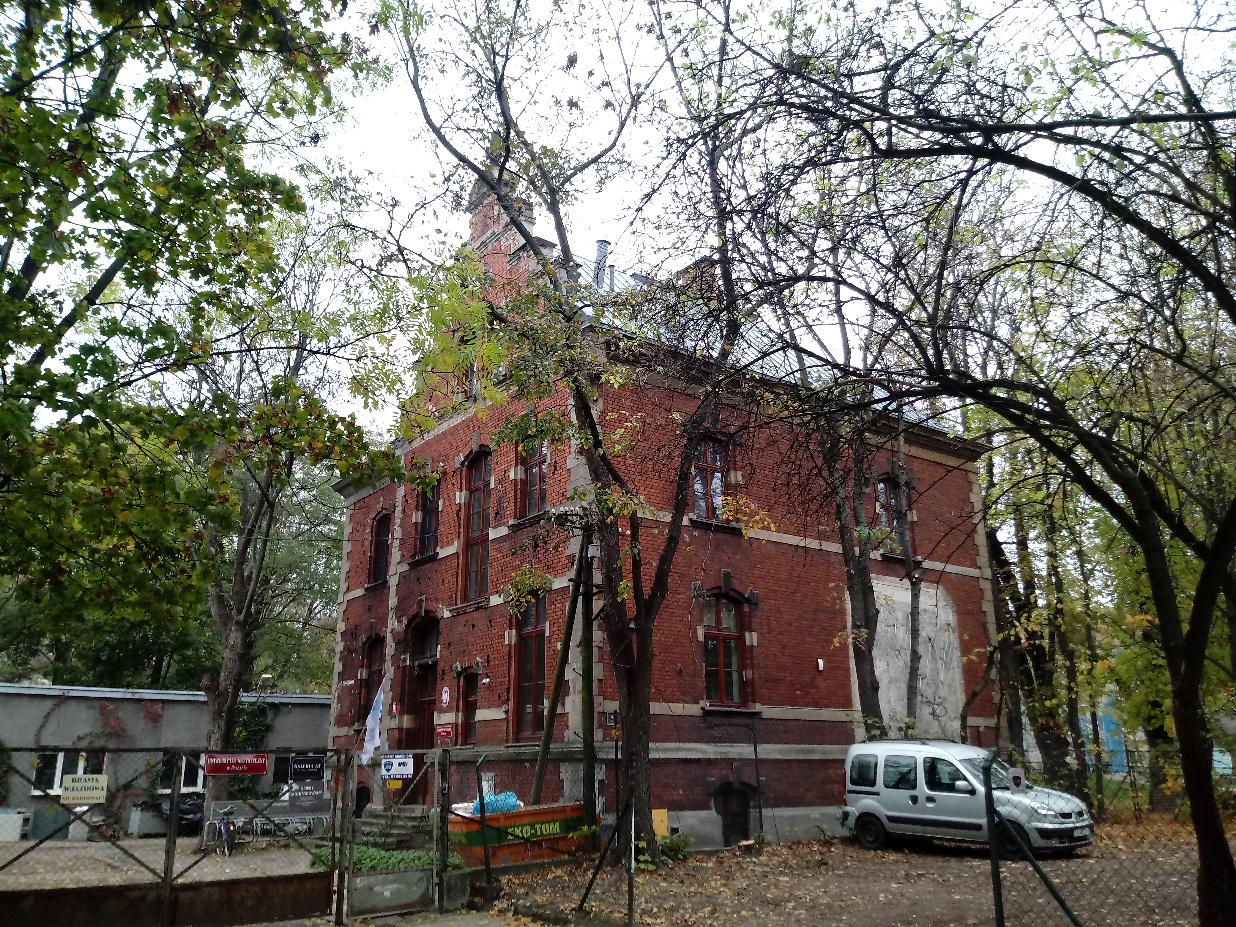 Gmach Dowództwa V Korpusu Armijnego w Poznaniu, ul Działowa róg ul. Solnej